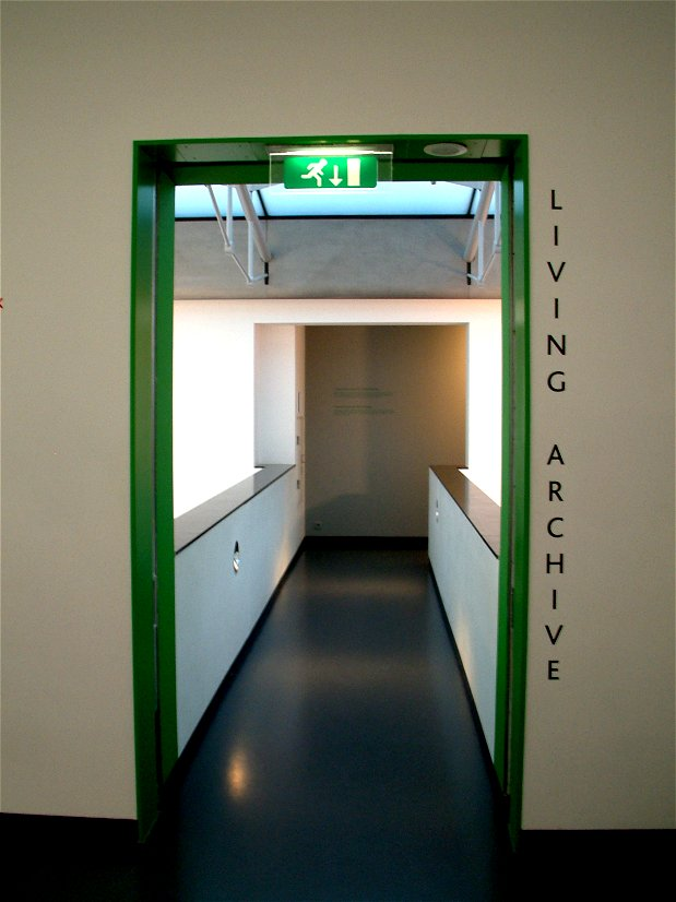 De architectuur van het van Abbemuseum in Eindhoven is al een kunstwerk op zich; zelfs de route naar de nooduitgang wordt tot kunst verheven.